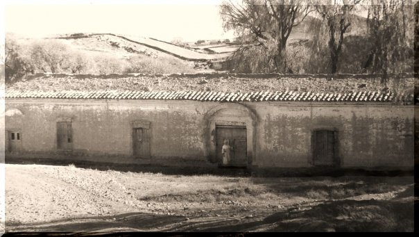 Forografía del año 1890 que muestra la Casona de los Marqueses del Valle de Tojo en la localidad de Yavi. Jujuy. Principios del siglo XX.